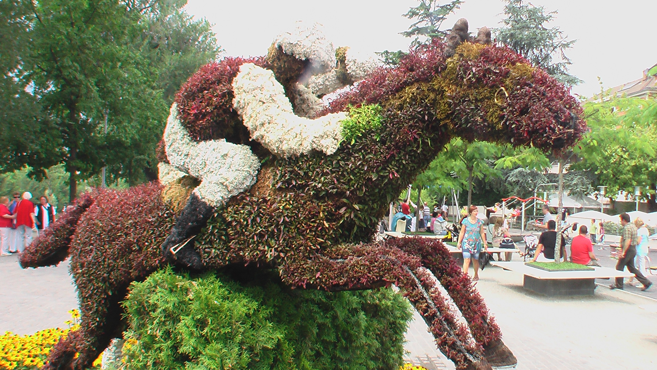 Meraner Blumenschmuck